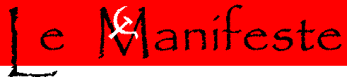 Логотип газеты Le Manifeste